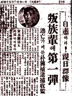 반민특위의 활동 시작을 보도한 1949년 1월 11일자 조선일보